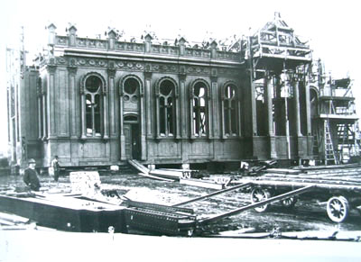 Желязната църква в Цариград в процес на сглобяване